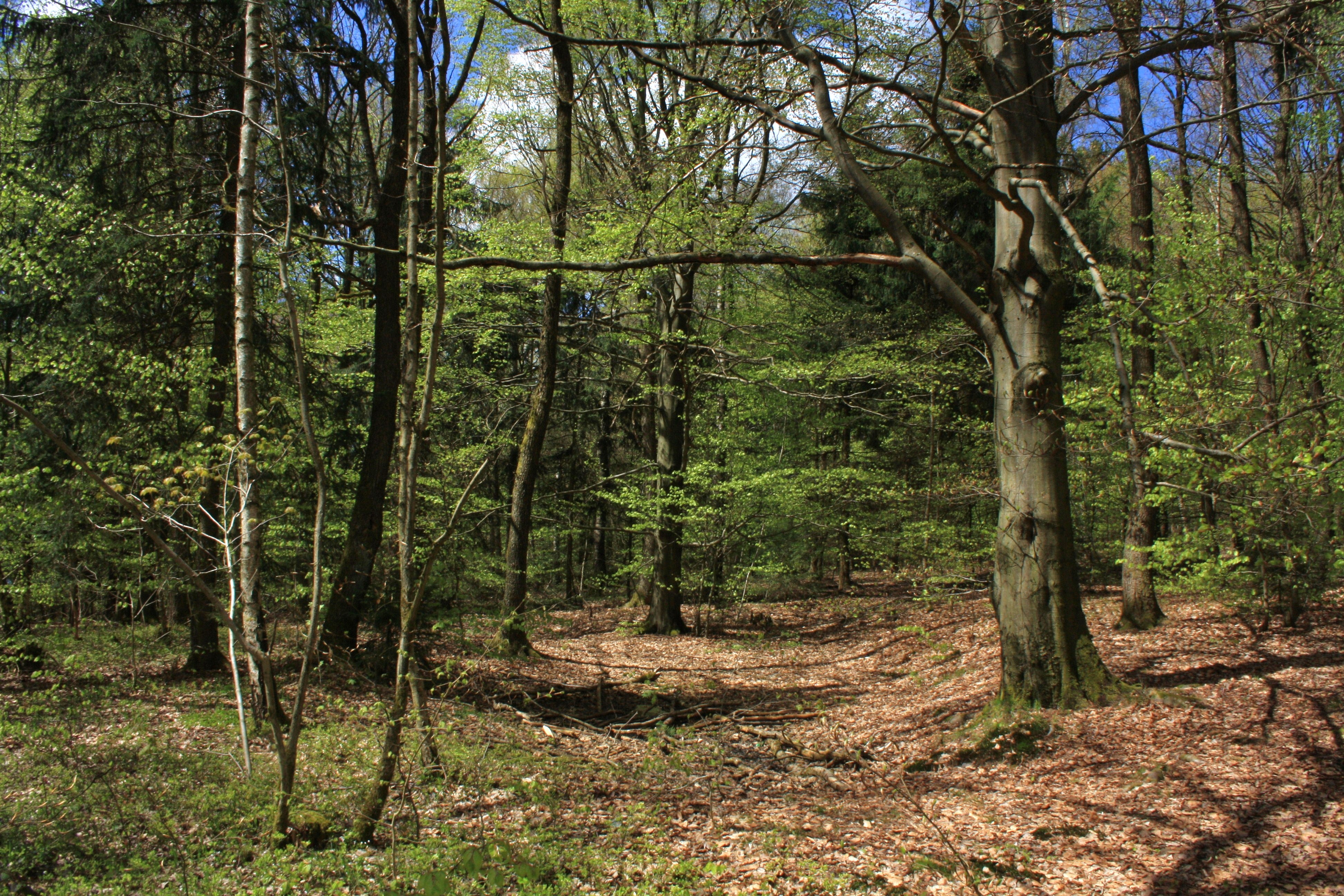 Buchenwald am Ebersberg, Landschaftsschutzgebiet „Hessische Rhön“ (LSG 2631001) und Naturpark Hessische Rhön